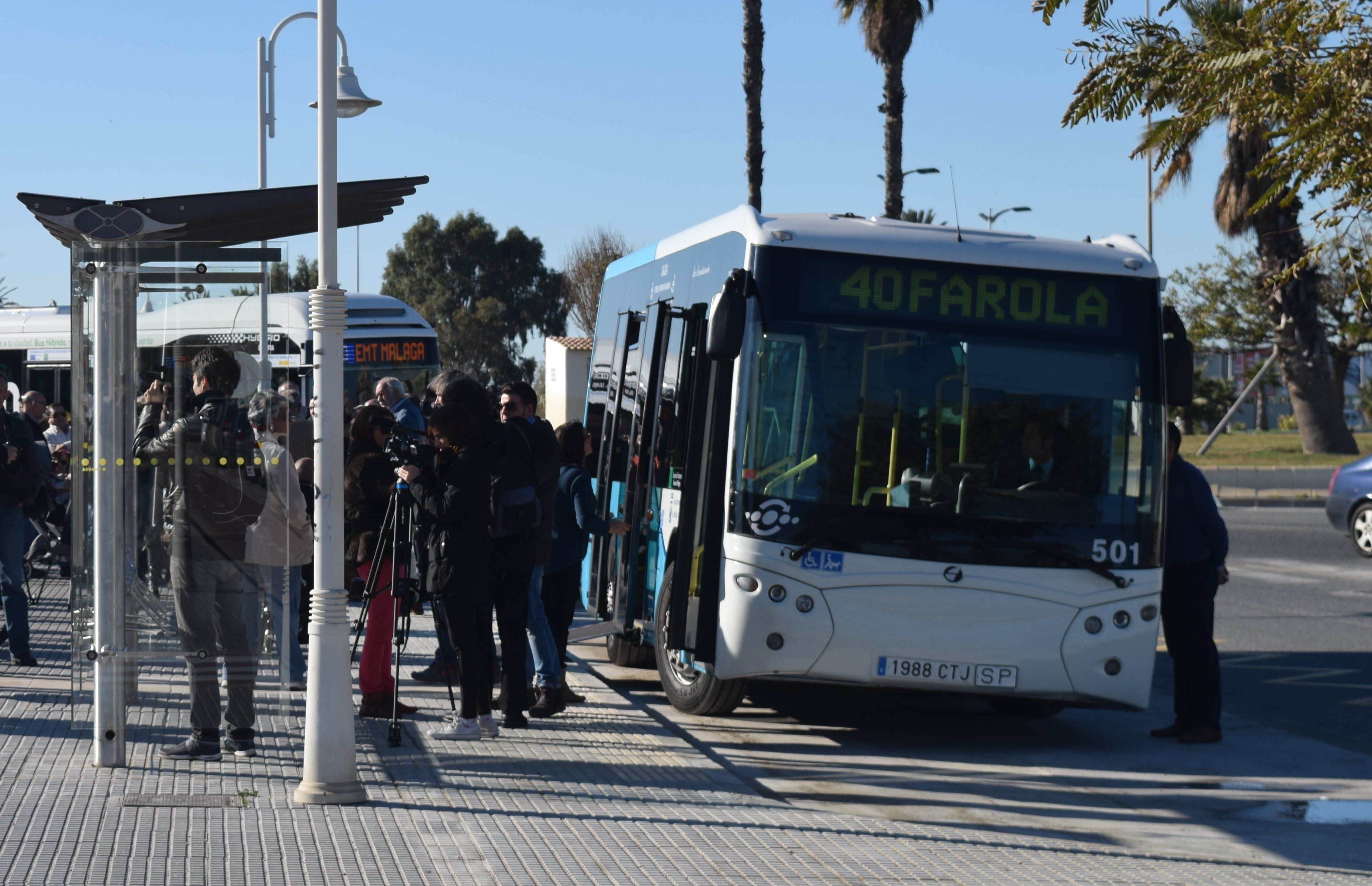 Evento en el que se citaron políticos y vecinos para conocer la nueva línea que conectaría el litoral malagueño oeste a través de esta línea de autobús.